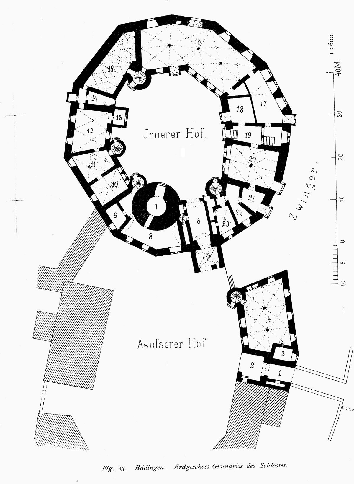 Grundrissskizze des Erdgeschosses des Schlosses in Büdingen 1890